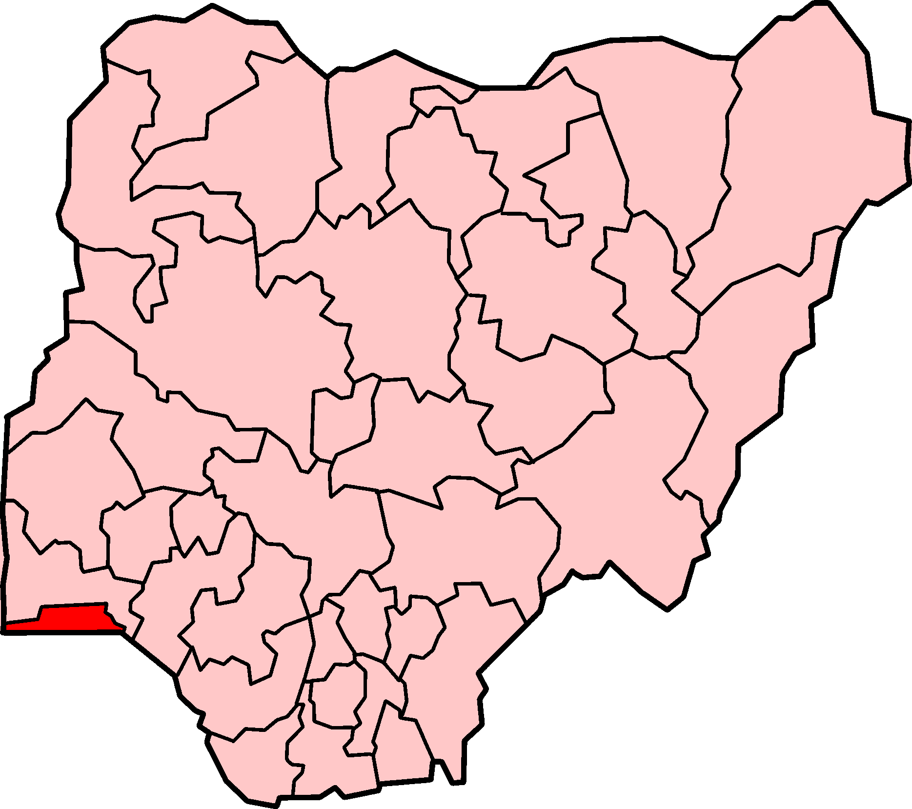 Localização do estado de Lagos na Nigéria.